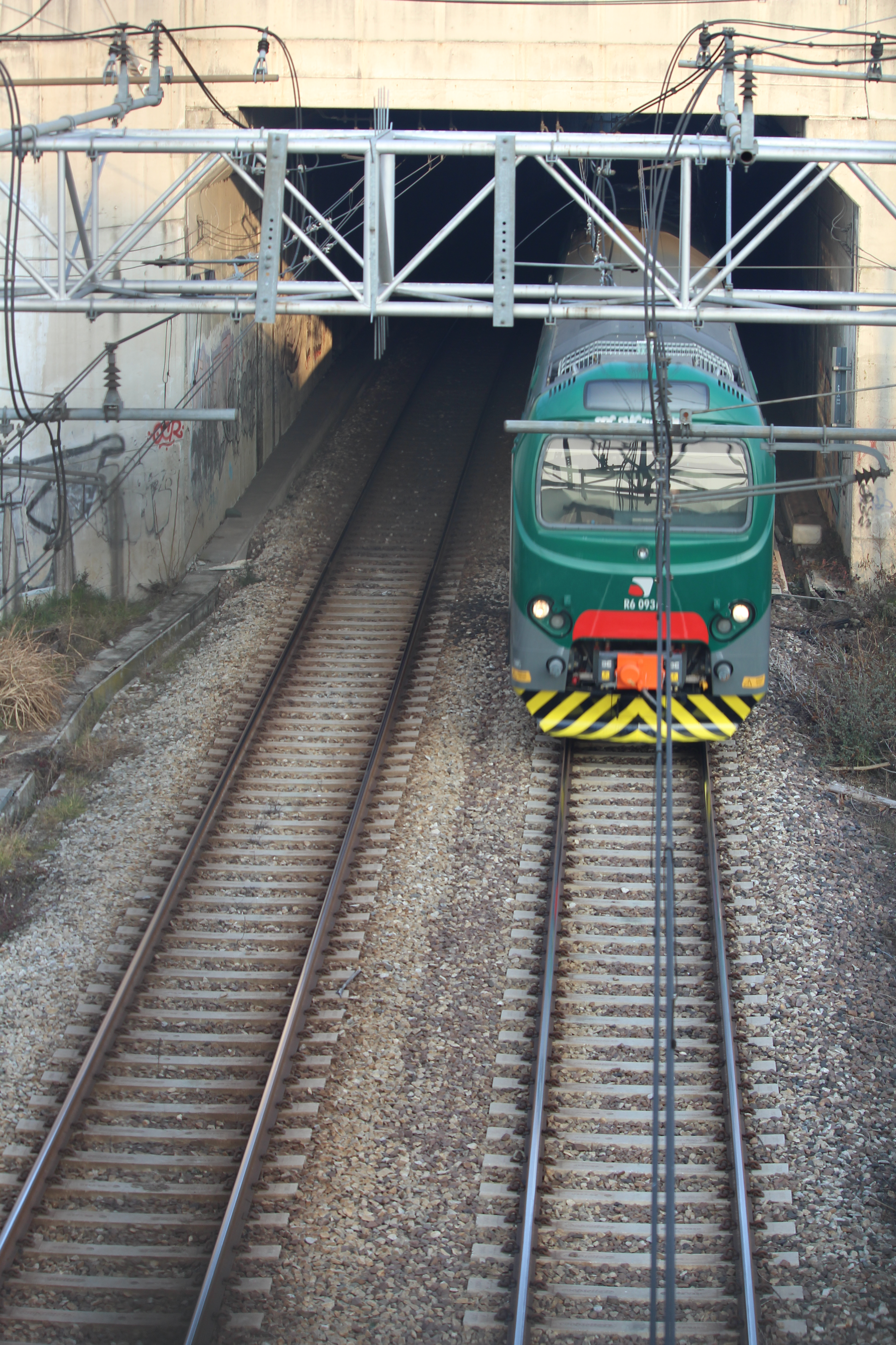 fotografia scattata dal passaggio sopra la ferrovia, al quartiere Ortica